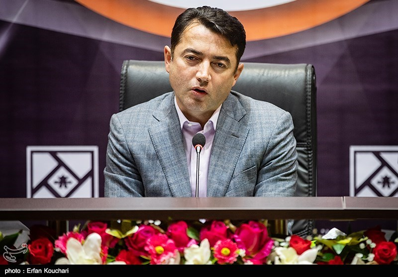 ۰۲ ارديبهشت ۱۳۹۸ - روند تکمیل پروژه فاز ۱۱ پردیس